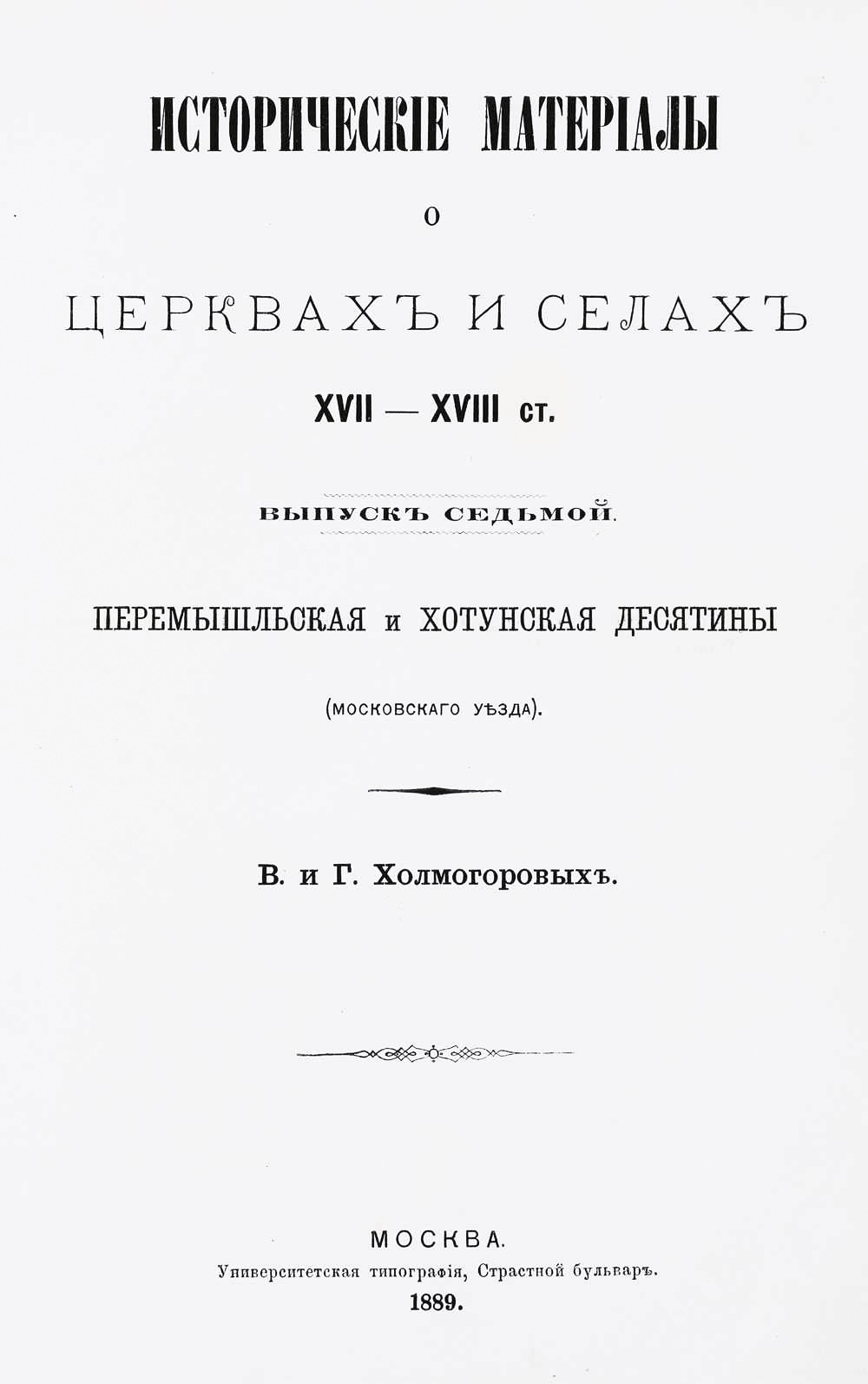 Титульный лист книги. Холмогоровы В. и Г. Исторические материалы о церквах и селах XVIII — XVIII ст. Выпуск 7. Москва, 1889.